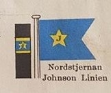 Skorstensmårke och rederiflagga för Norstjernan Johnson Linjen.